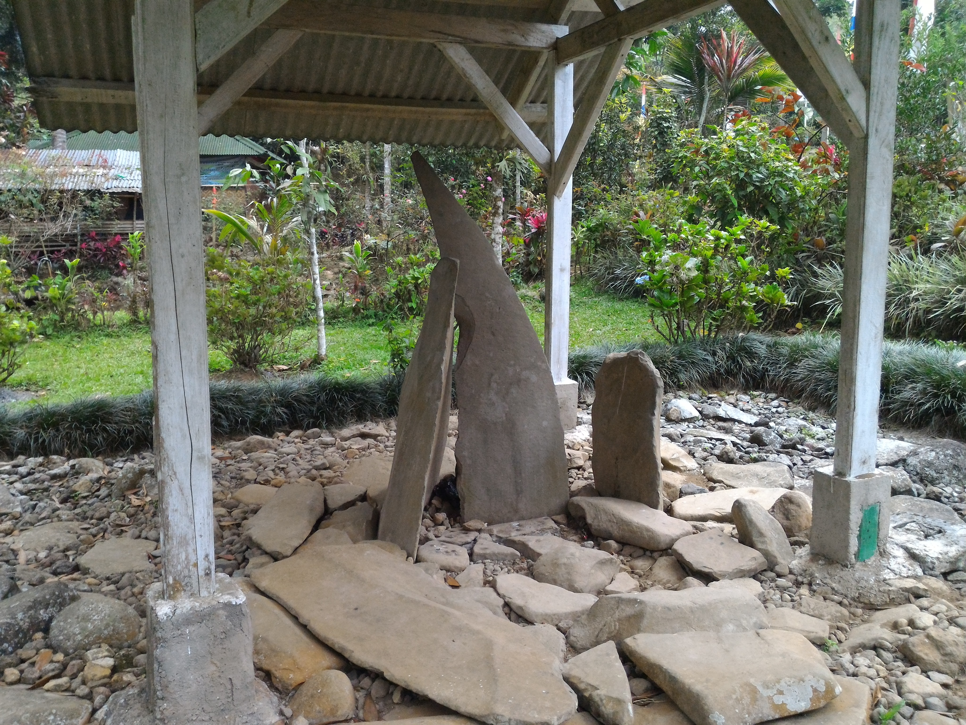 Basa Sunda: Situs Batu Kujang